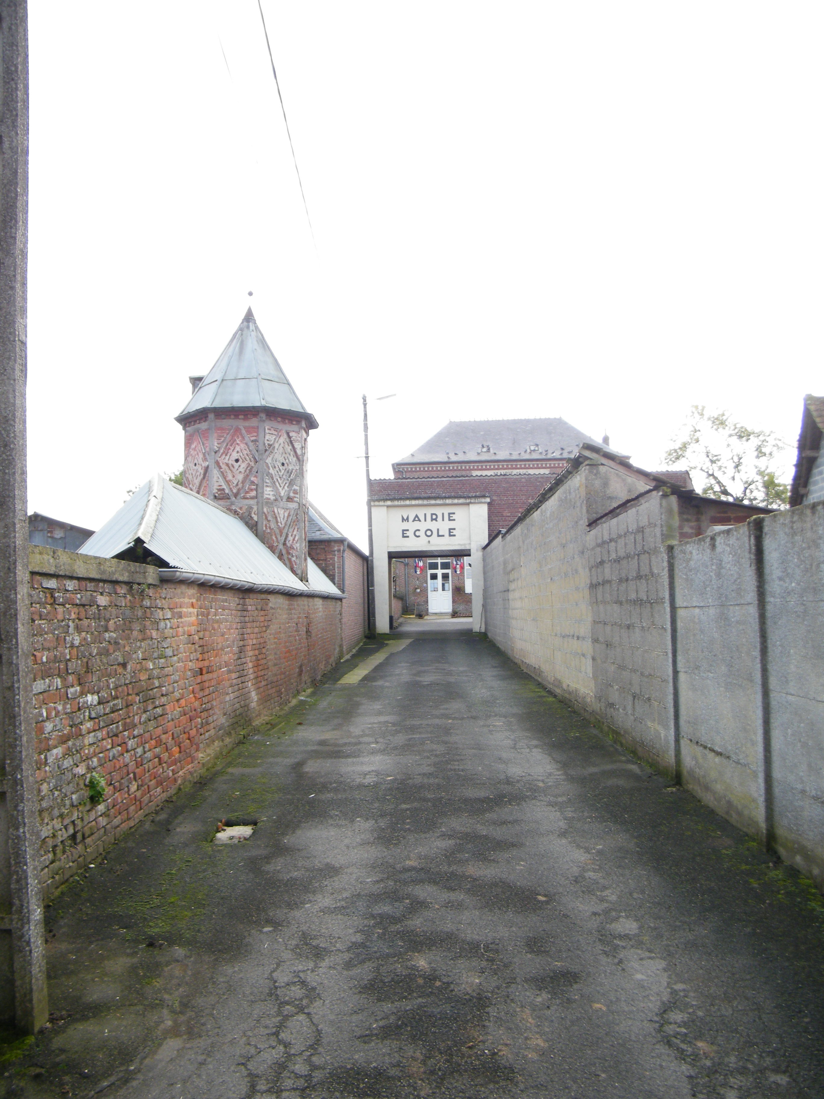 Maison-Roland, Somme, mairie-école